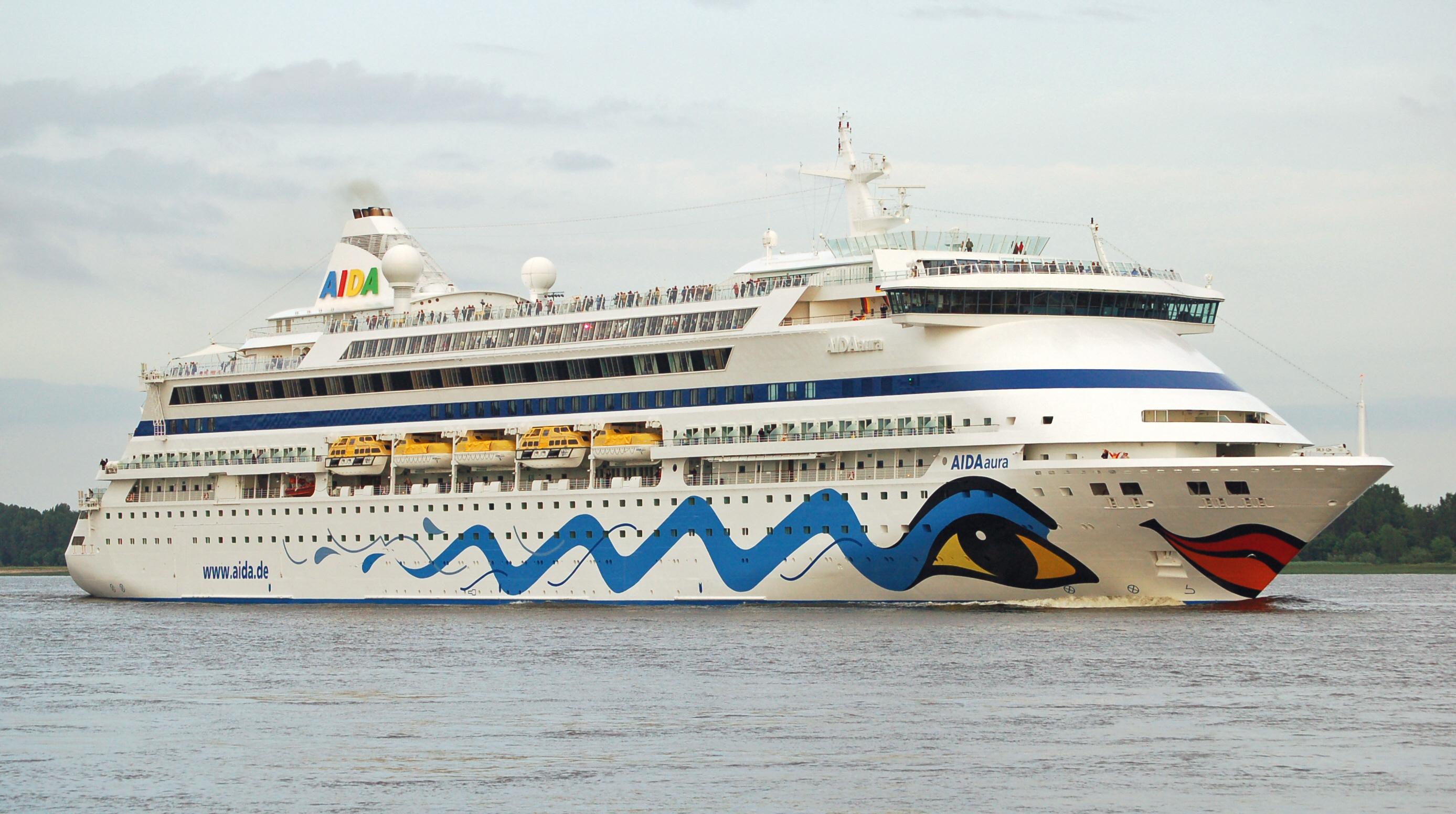 Die AIDAaura am Abend auf der Elbe bei Wedel IMO-Nummer: 9221566 MMSI-Nummer: 247117400 Rufzeichen: IBNZ Länge: 203.0m Breite: 28,0m Flagge: Italy